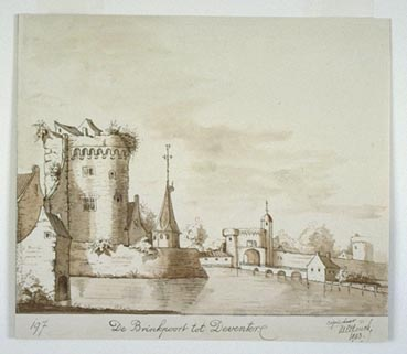 Kopie naar originele tekening: Brinkpoort, links oude toren. Aan water. Naar de poort een weg over het water. Erachter geboomte. Opschrift: De Brinkpoort tot Deventer Gesign. r.o. kopie door M.E.Houck 1903 .